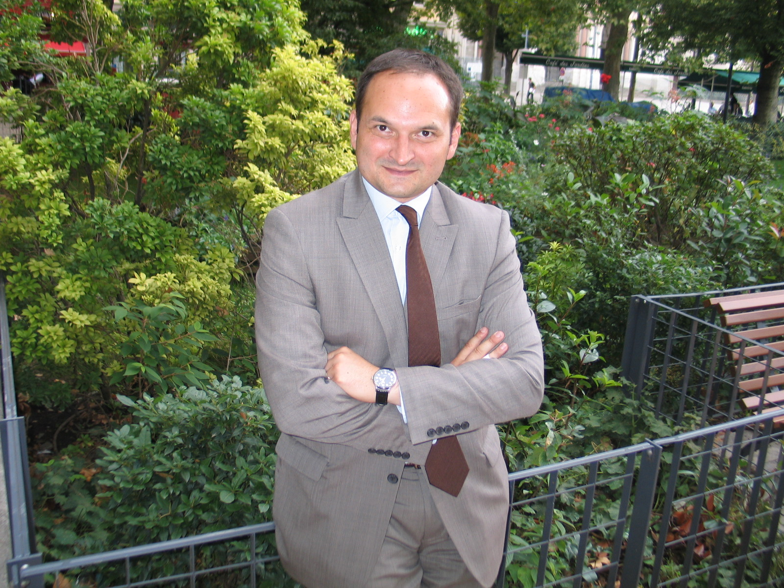 Portrait de Régis Juanico, Député de la Loire